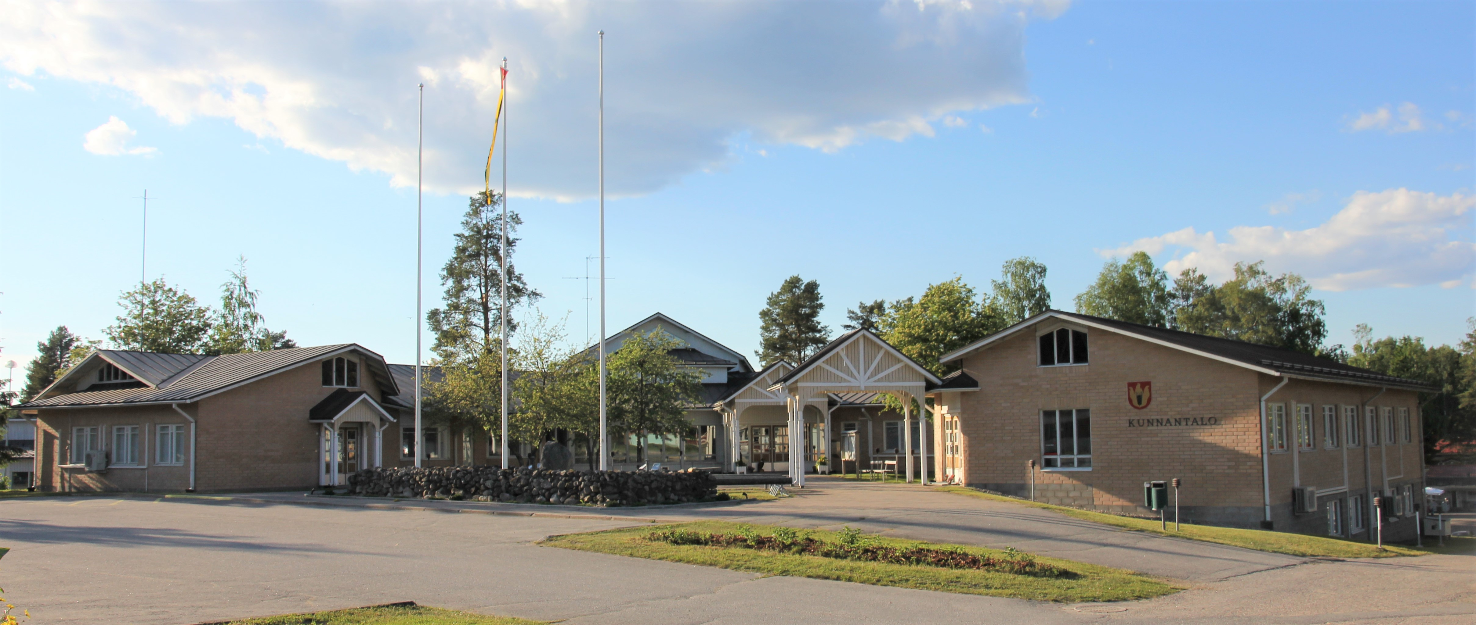 Pertunmaan kunnantalo Pertunmaalla Etelä-Savossa.